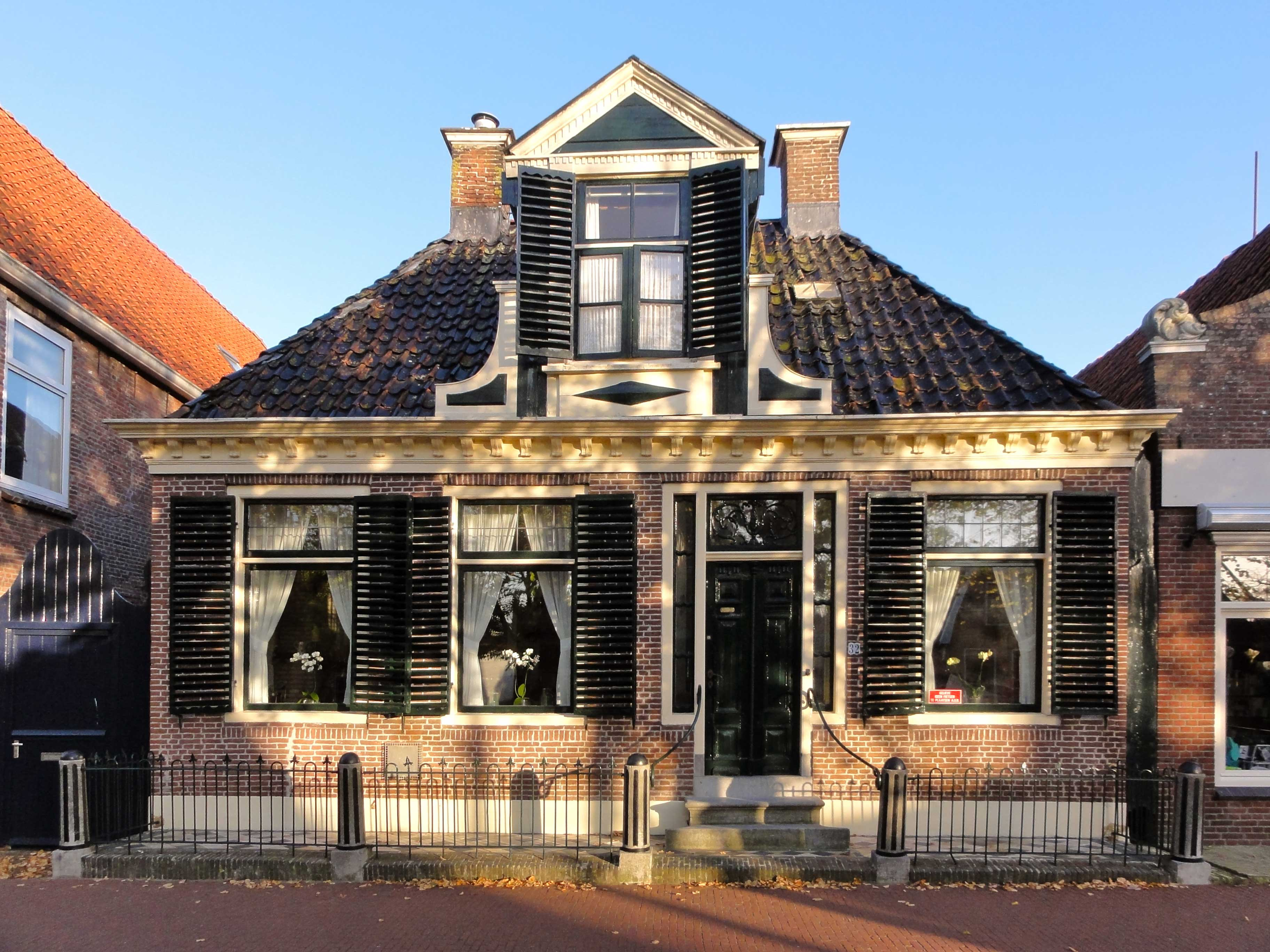 Van Swinderenstraat 32 Balk